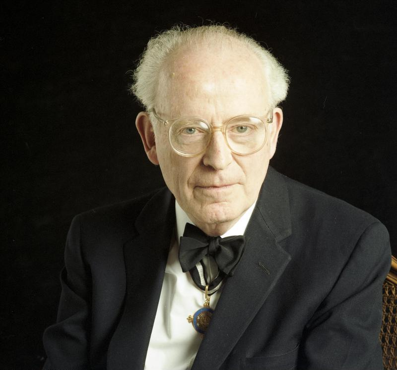 6.6.1988 Prof. Dr. Ernst Kitzinger (USA) Kunsthistoriker Mitglied des Ordens Pour le Mérite für Wissenschaften und Künste